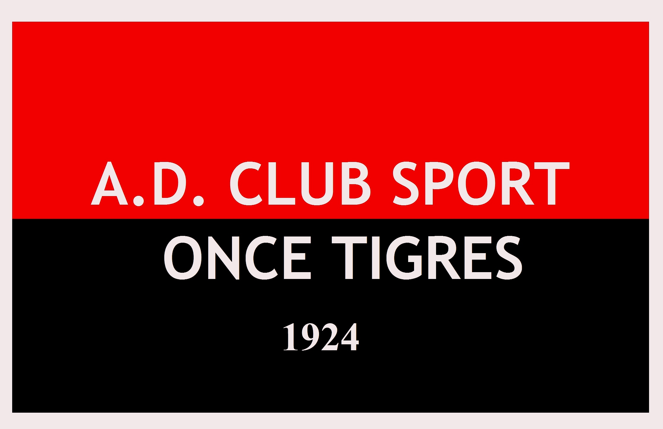 Colores de la A.D. Club Sport Once Tigres La Asociación Deportiva Once Tigres es un club de fútbol de Costa Rica, con sede en la provincia de Cartago. Fue fundado en 1924 y actualmente está jugando en el fútbol de tercera división de LINAFA. Esta reseña histórica se remonta a los años que van de 1924 a 1976 cuando Once Tigres formó la auténtica y única onceava brumosa de lo que sería un equipo humilde, de barrio, que se mantuvo efímeramente en la primera división y que luego participa nuevamente en los campeonatos distritales. La lucha del equipo de la barriada cartaginesa fue muy difícil para llegar a la liga de los consagrados; porque jugó casi cuarenta años, hasta que al fin obtiene el derecho de asistir al torneo de campeones distritales para buscar el ansiado pase a la Liga Nacional de Fútbol de Costa Rica, tercera división. Y en 1968 se corona campeón. El director técnico fue Didier Saénz. Sigue la superación porque en 1974 gestiona la renovación de su personería jurídica para su aprobación y convertirse en Asociación Deportiva. Para 1975 ya tenemos a los tigres debidamente inscritos en la Federación Nacional de Fútbol y participando en el Festival de Cartago, donde exhiben con mucho orgullo 150 trofeos; incluyendo el obtenido en Panamá. Vuelve a la carga en 1976 y otra vez campeoniza pasando a la tercera división, en calidad de invicto y de la mano de Augusto Quesada. Y es campeón en su división.